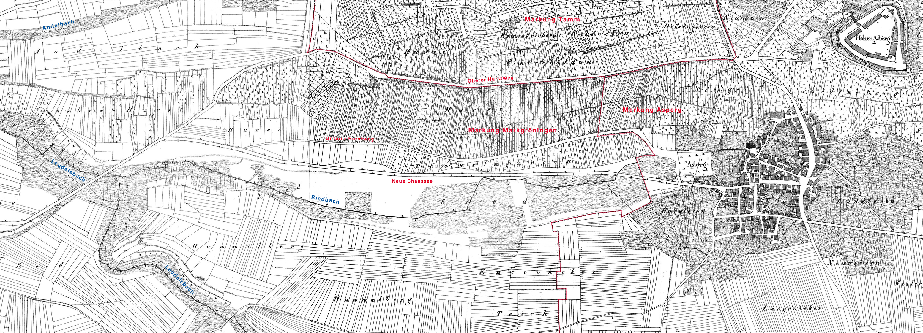 Hurst auf der Urflurkarte von 1832 (Composit aus XXXVIII, Blätter 4, 5 und 6)